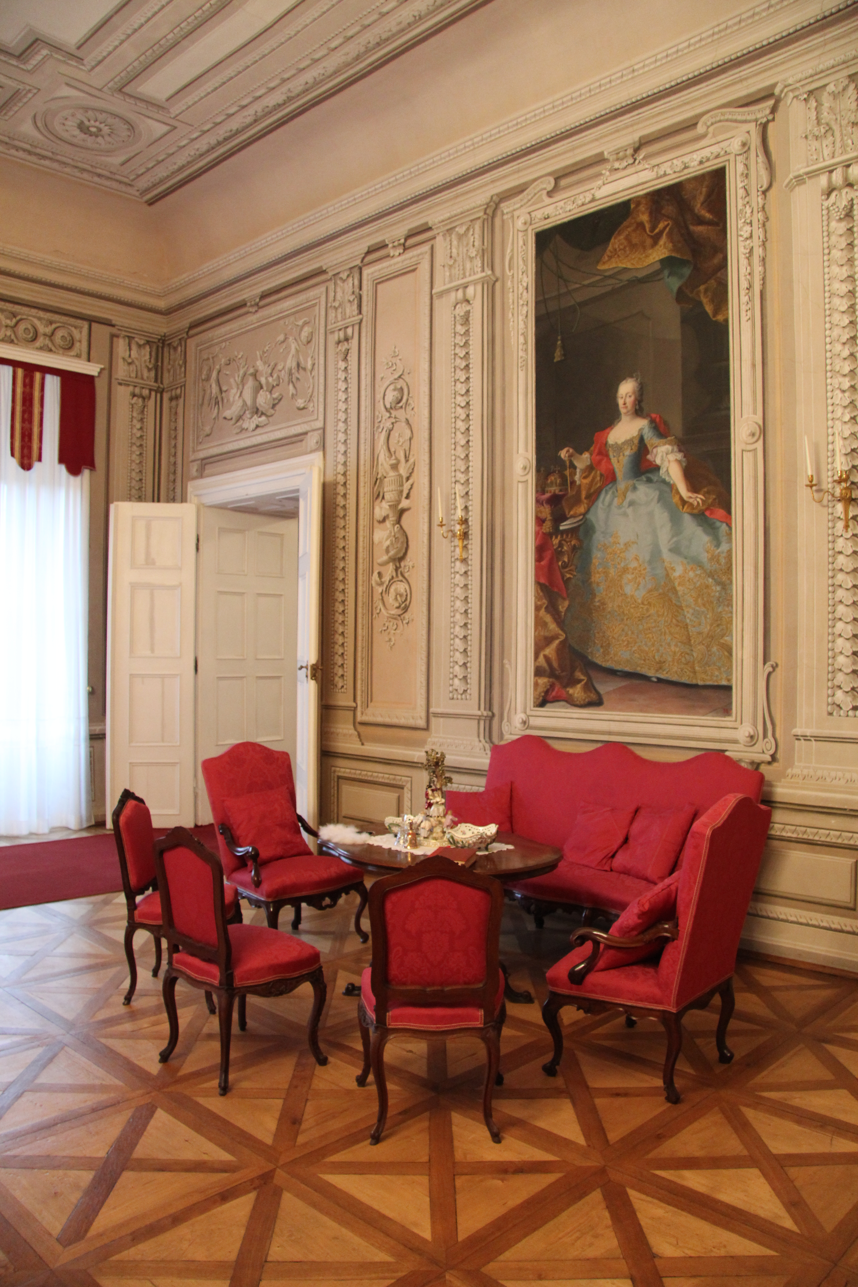 Audienční sál na zámku v Litomyšli (2017)